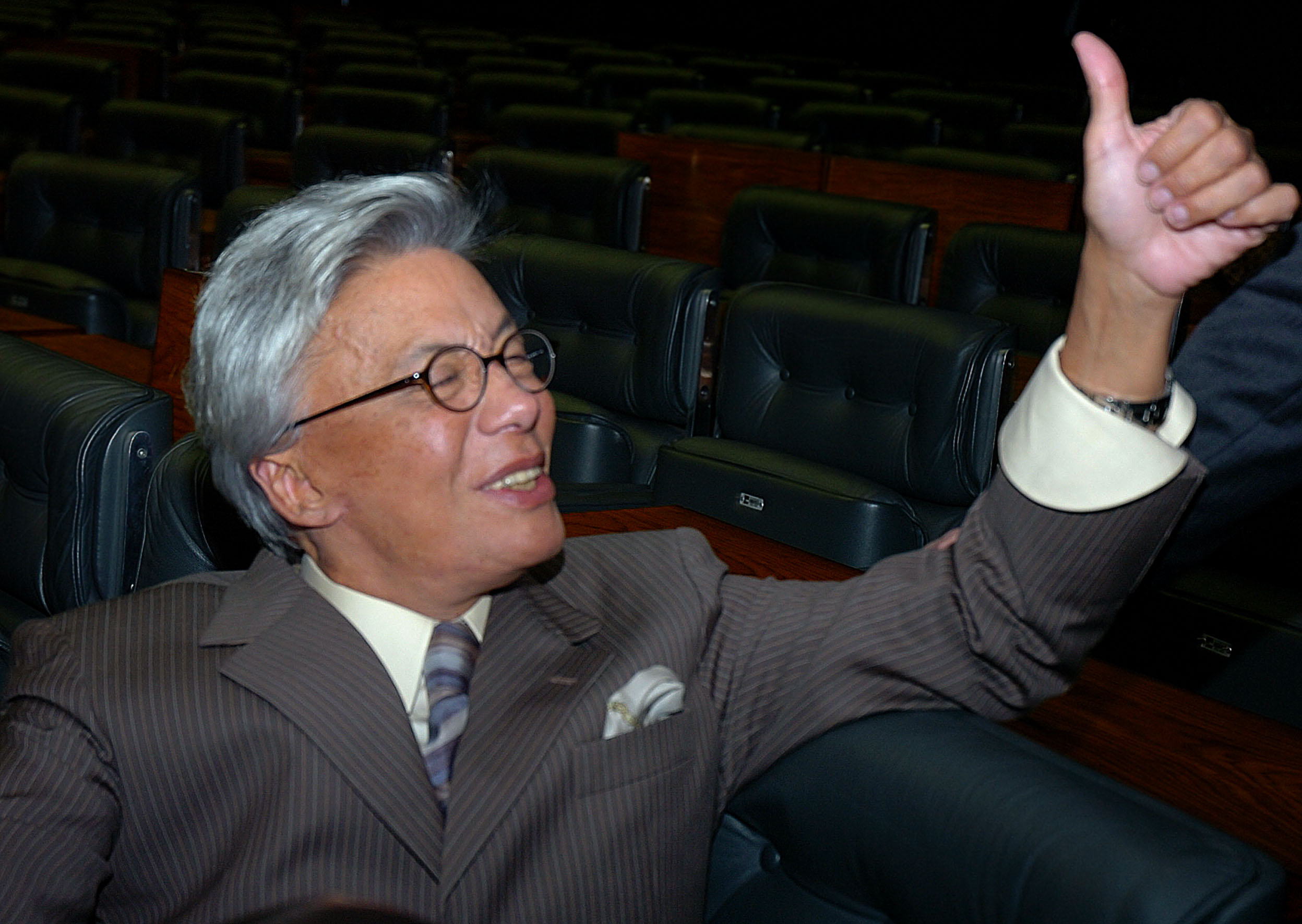 O deputado brasileiro Clodovil Hernandes no plenário da Câmara dos Deputados em Brasília.